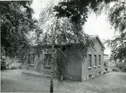 Nydalen bad, Sandakerveien 138. Åpnet 1913, nedlagt 1964.